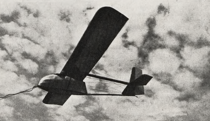 Szybowiec Czajka z kabiną pilota, Bezmiechowa, wrzesień 1932 r.